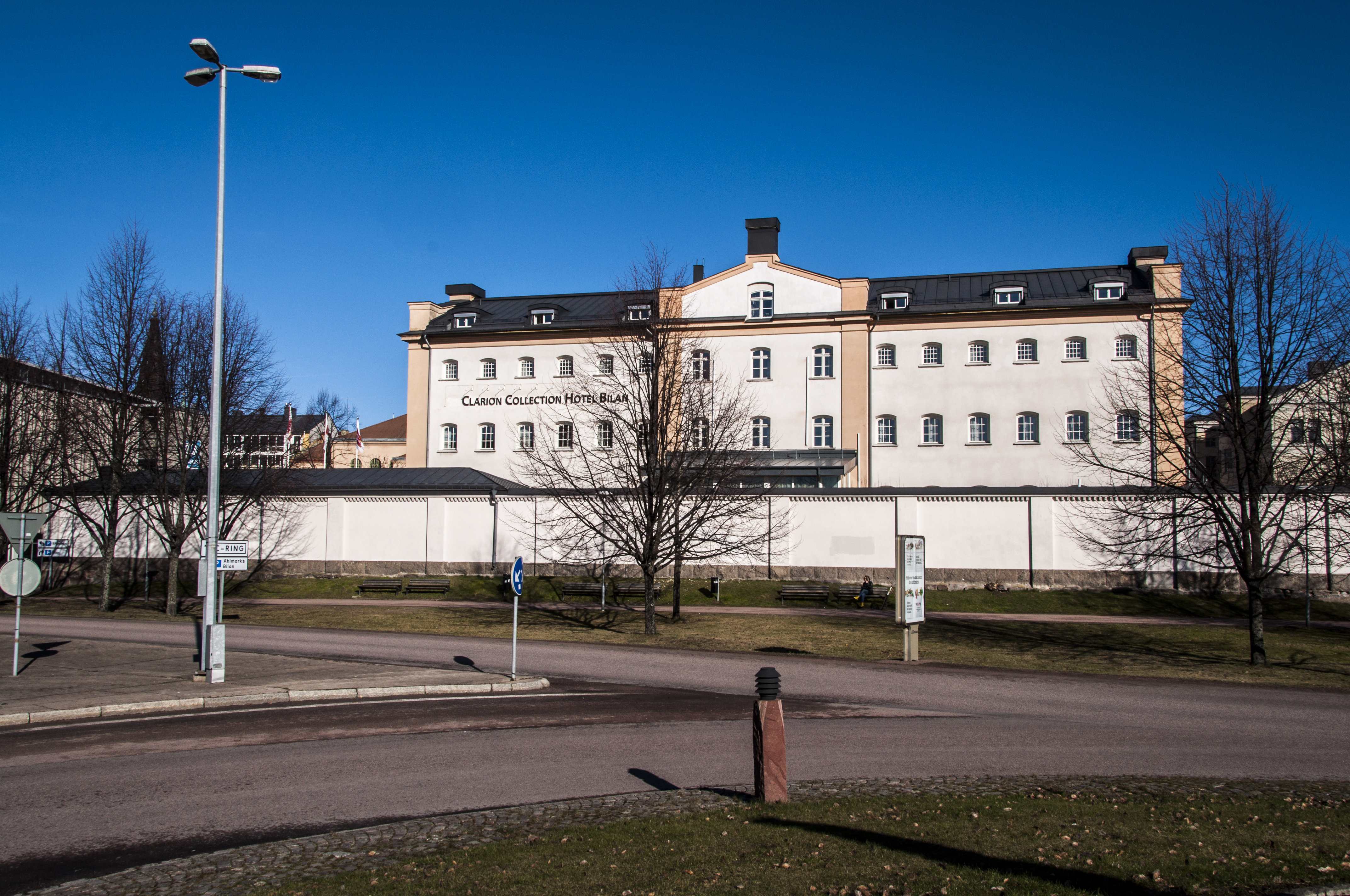 Gamla Länscellfängelset i Karlstad byggnadsår 1847 efter typritning av Carl Fredrik Hjelm.